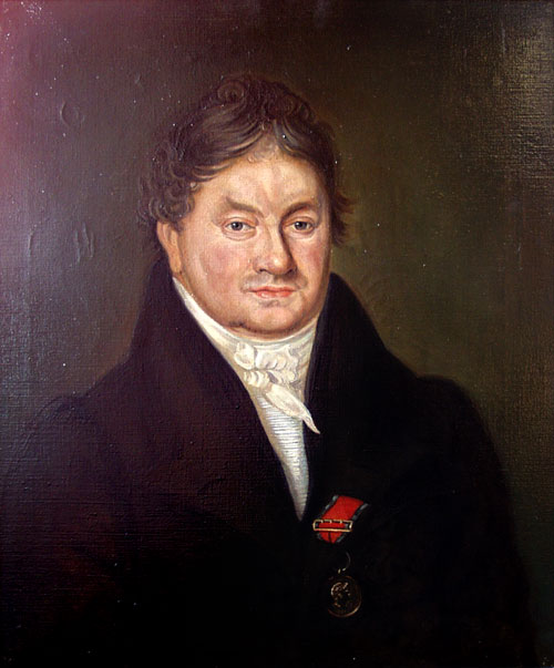 Johann von Dassel; Öl auf Leinwnad, 61 x 51 cm; Kopie von 1930 eines Originals von Nicolaus Peters um 1840; Museum für das Fürstentum Lüneburg